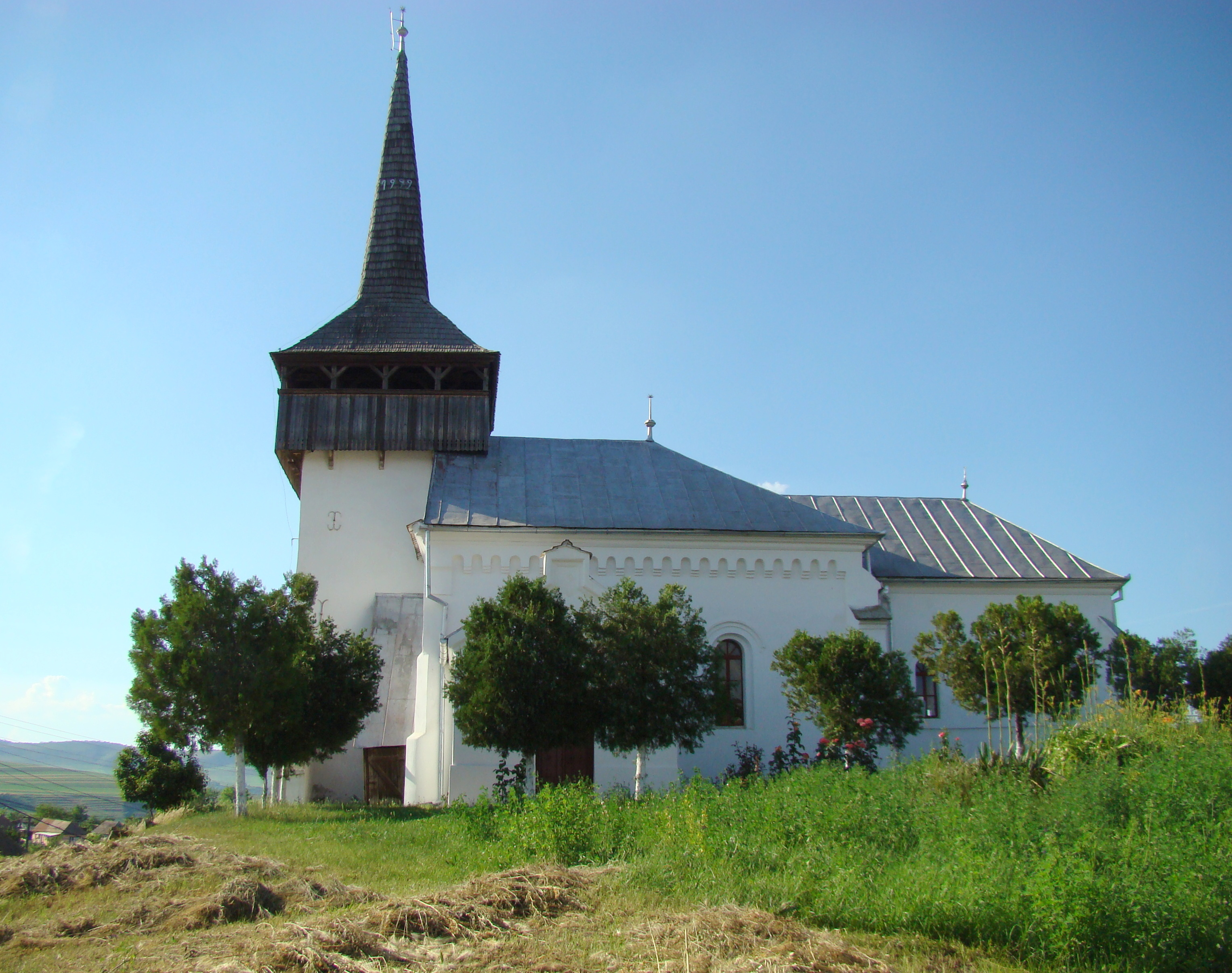 Biserica reformată, sat Bucerdea Grânoasă; comuna Bucerdea Grânoasă, județul Alba